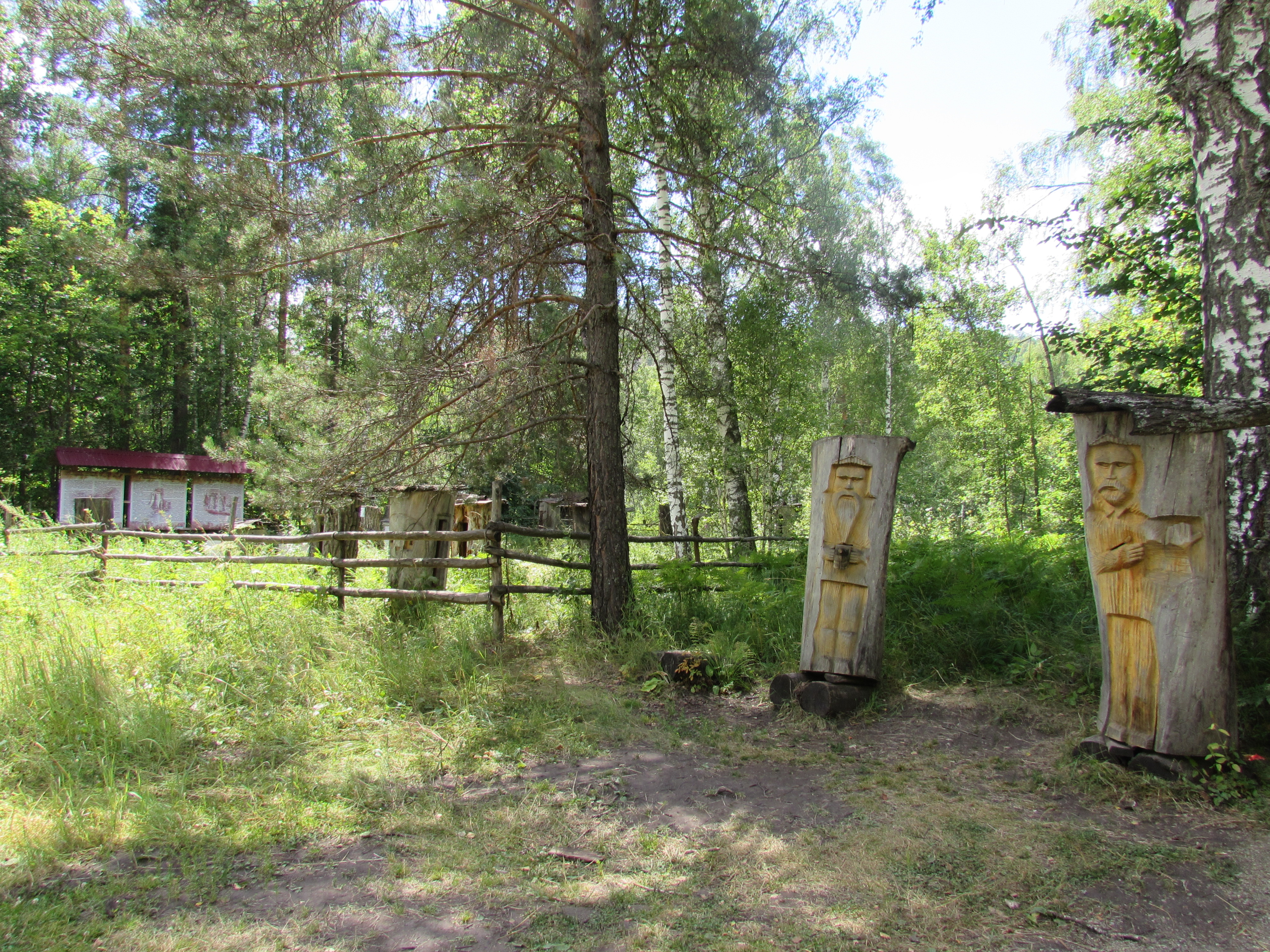 Башҡортса: Башҡорт викимедиасыларының Шүлгәнташҡа сәйәхәте